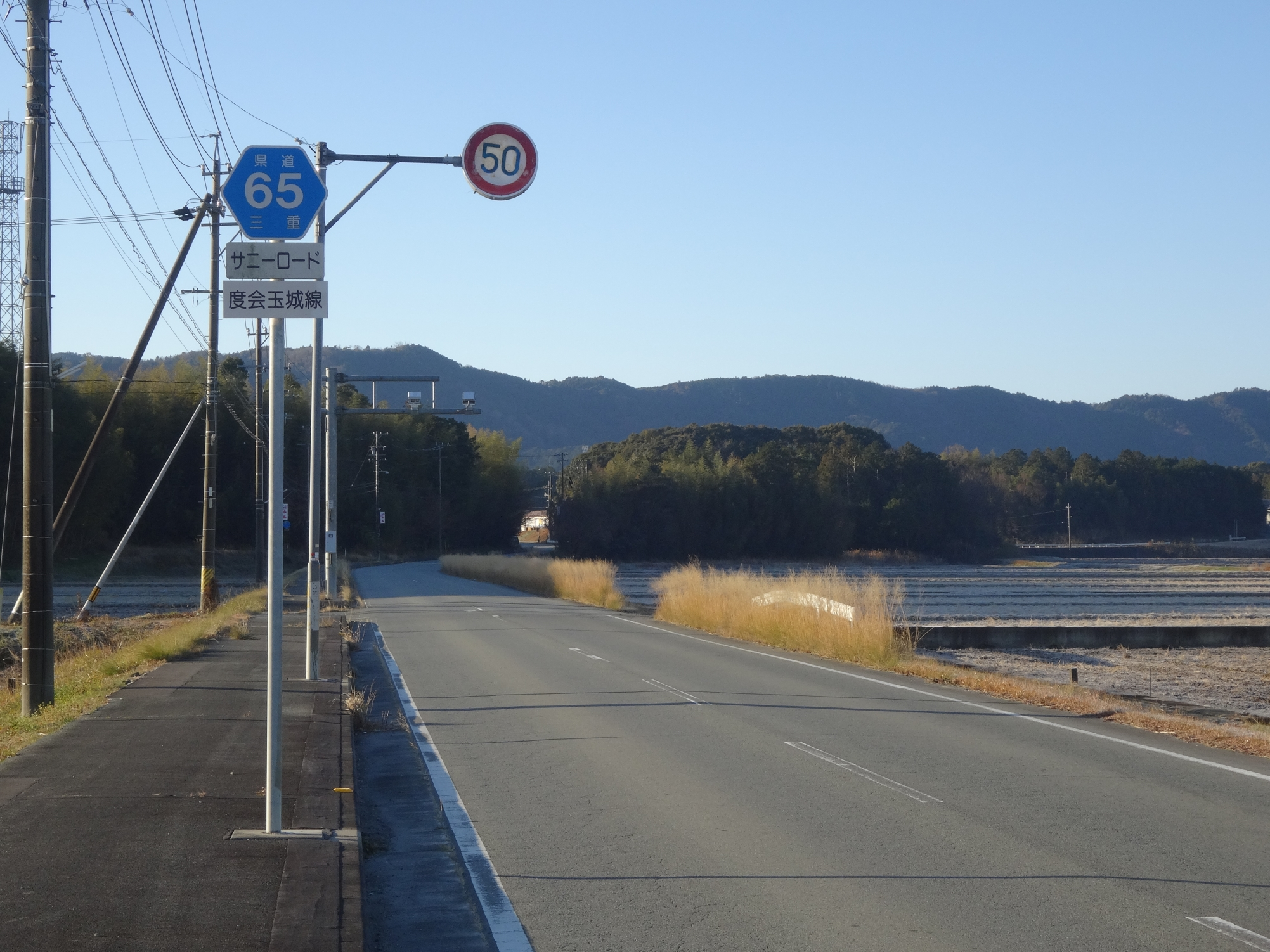 三重県道65号度会玉城線（サニーロード、三重県度会郡玉城町、勝田西交差点付近より撮影）